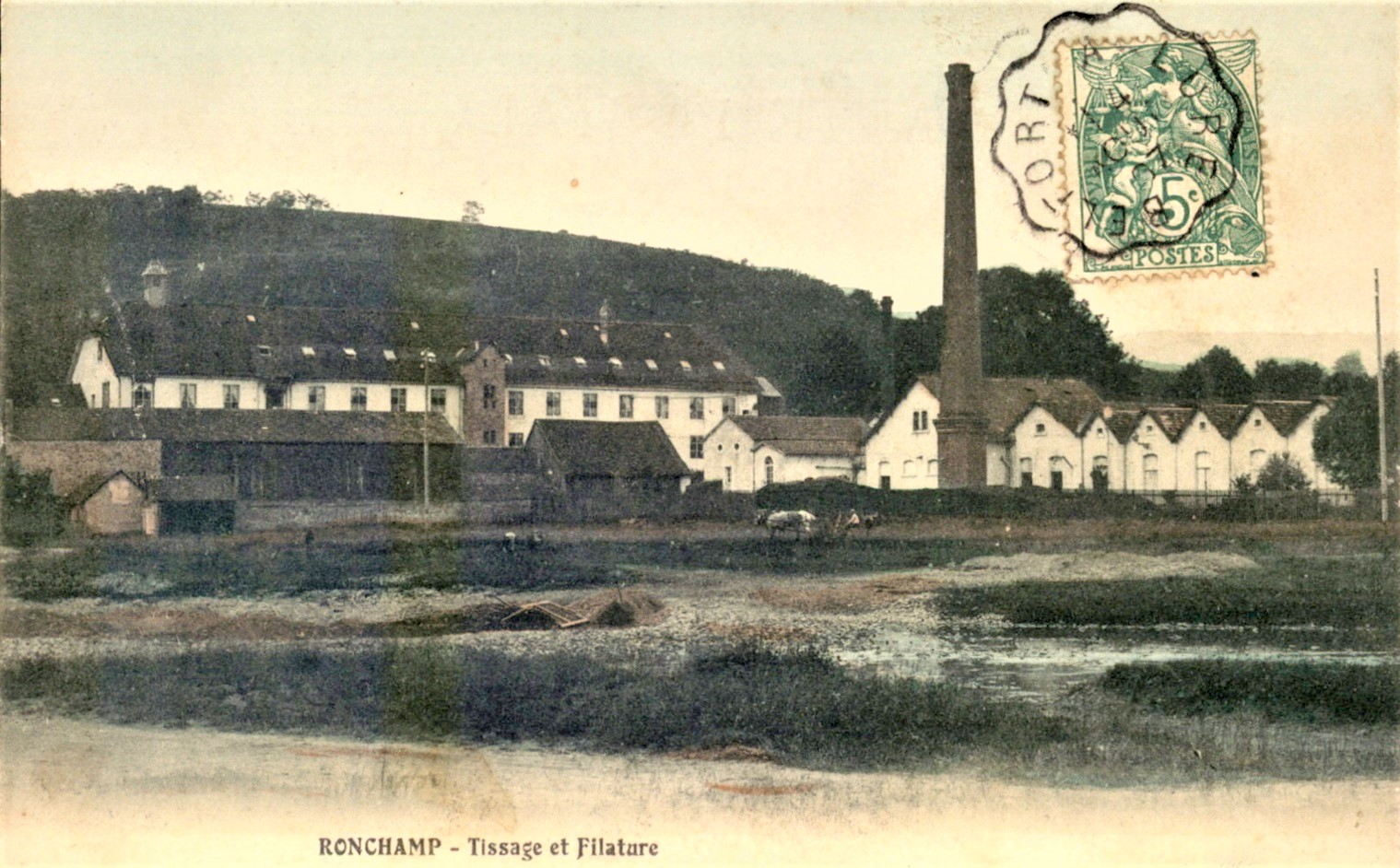 L'ancien tissage de Ronchamp.